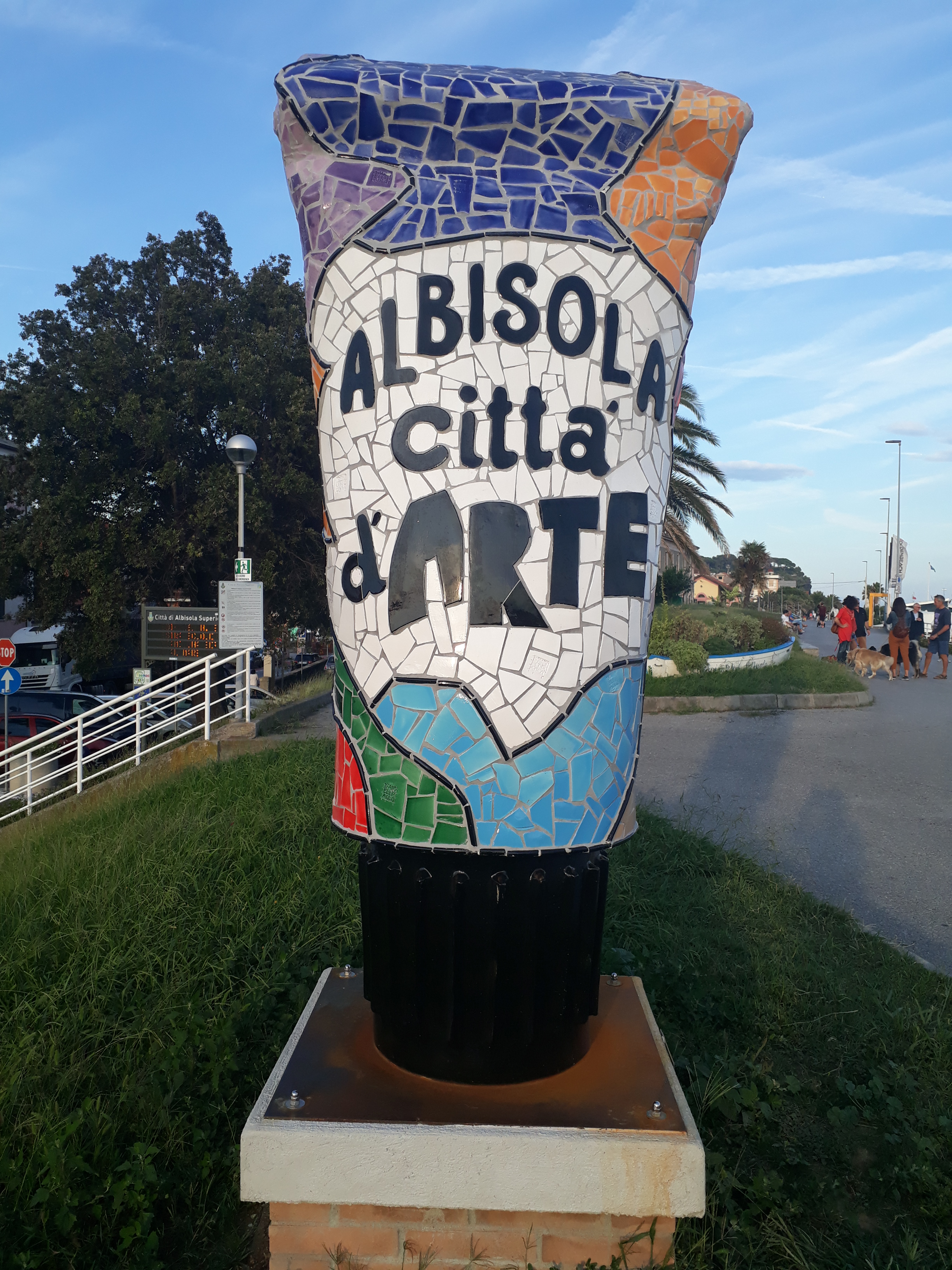 Opere artistiche presenti sulla passeggiata Eugenio Montale This is a photo of a monument which is part of cultural heritage of Italy.